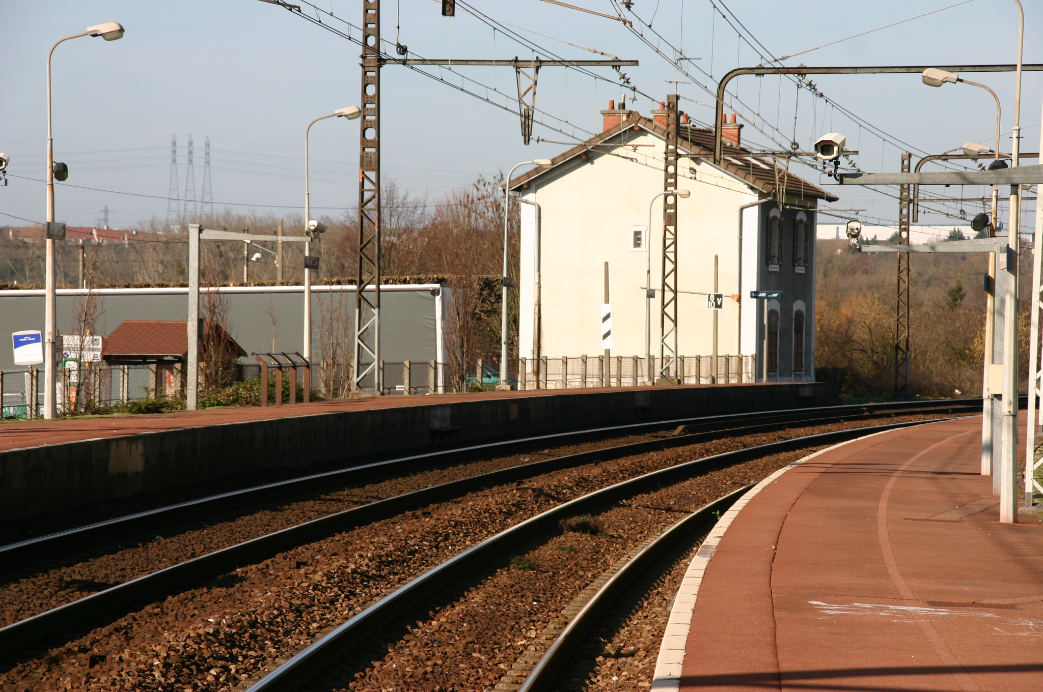 La gare de Villabé, Villabé, département de l'Essonne (France)